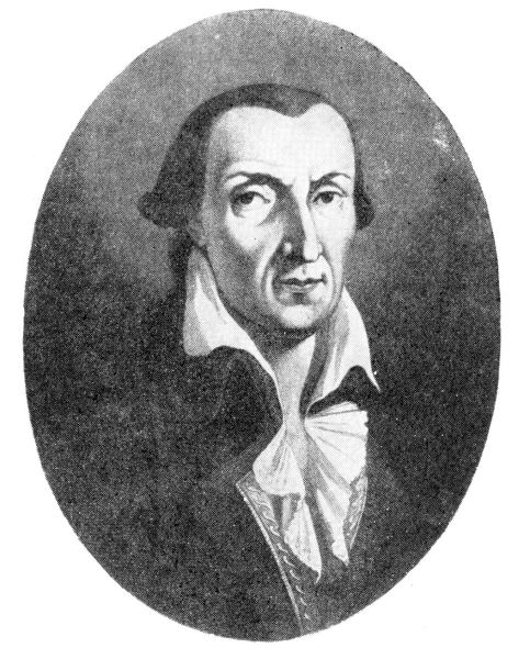 J. F. Schwoy